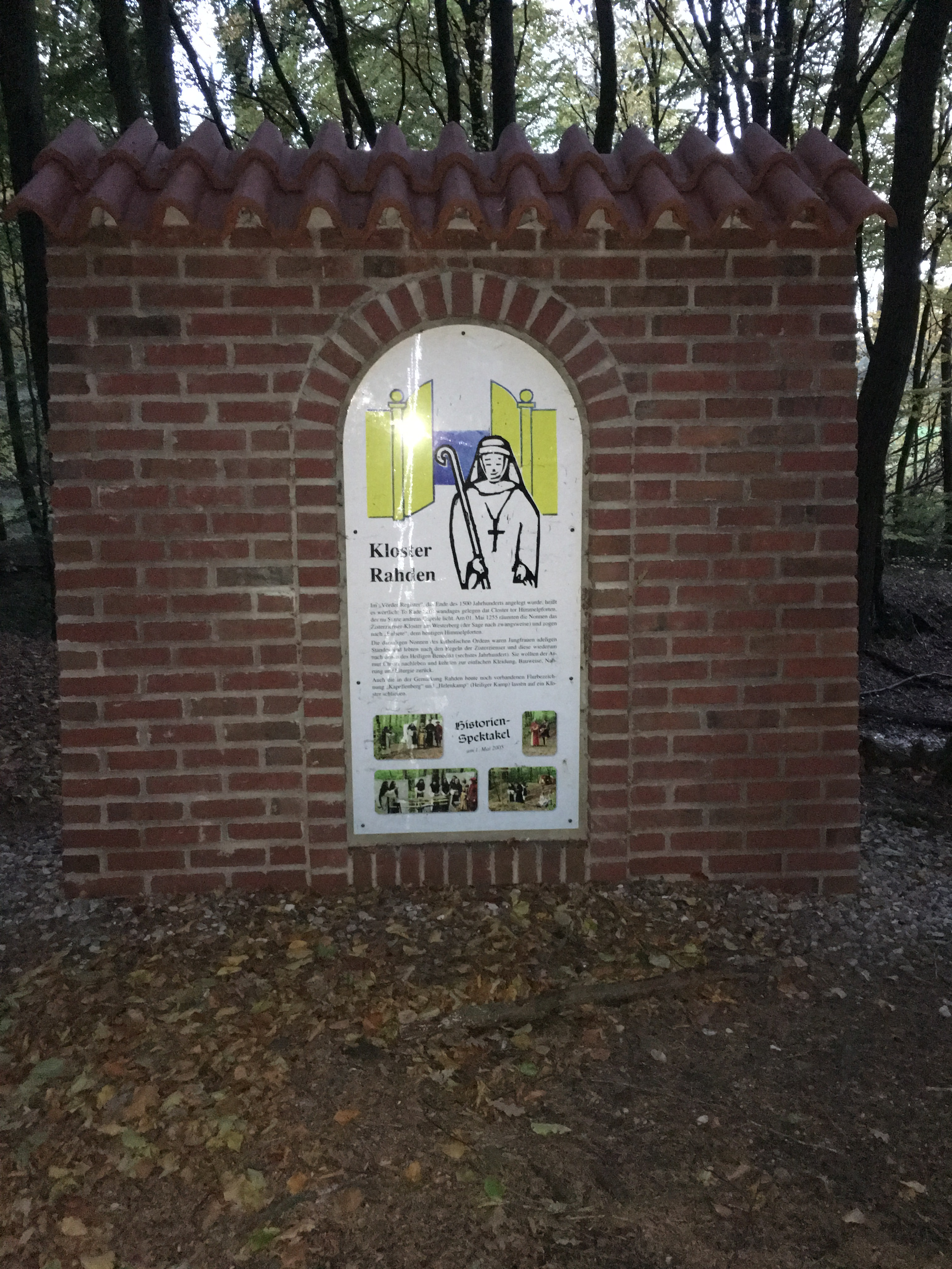 Infowand to dat Klooster Rahden